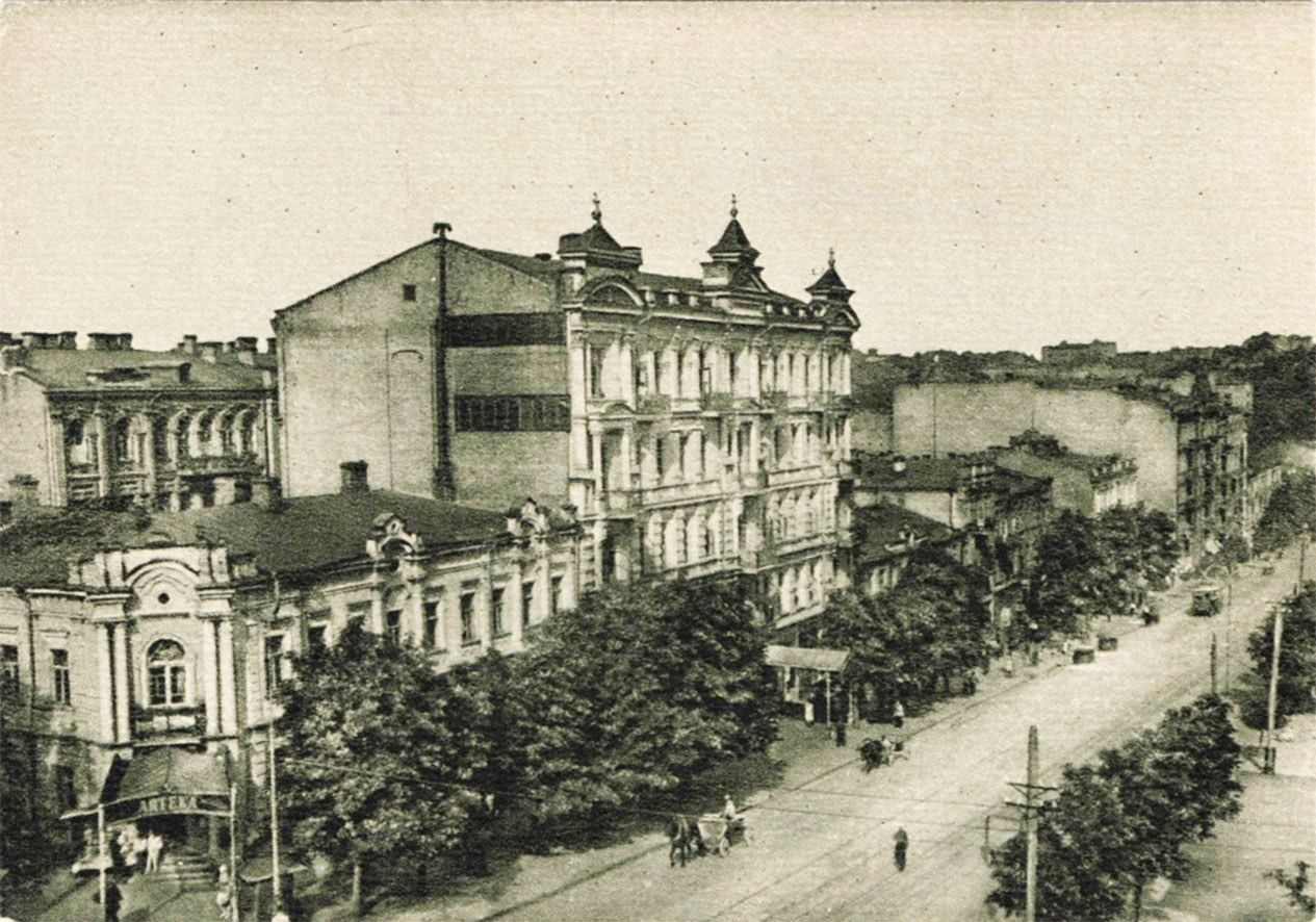 Аптека № 1 і готель «Ермітаж», сучасна вулиця Богдана Хмельницького, Київ